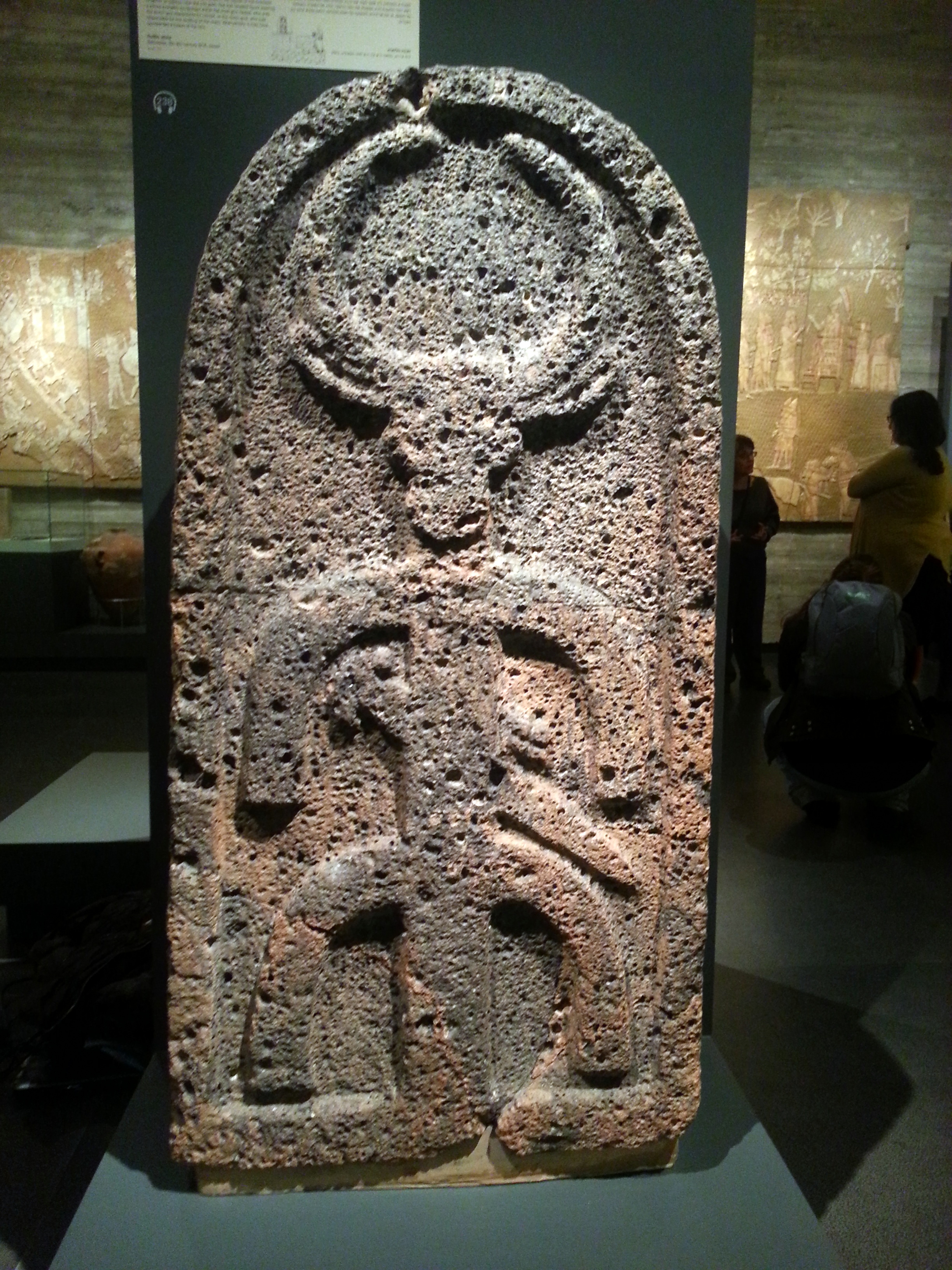 העתק מצבת בית צידא, מוצב במוזאון ישראל בירושלים